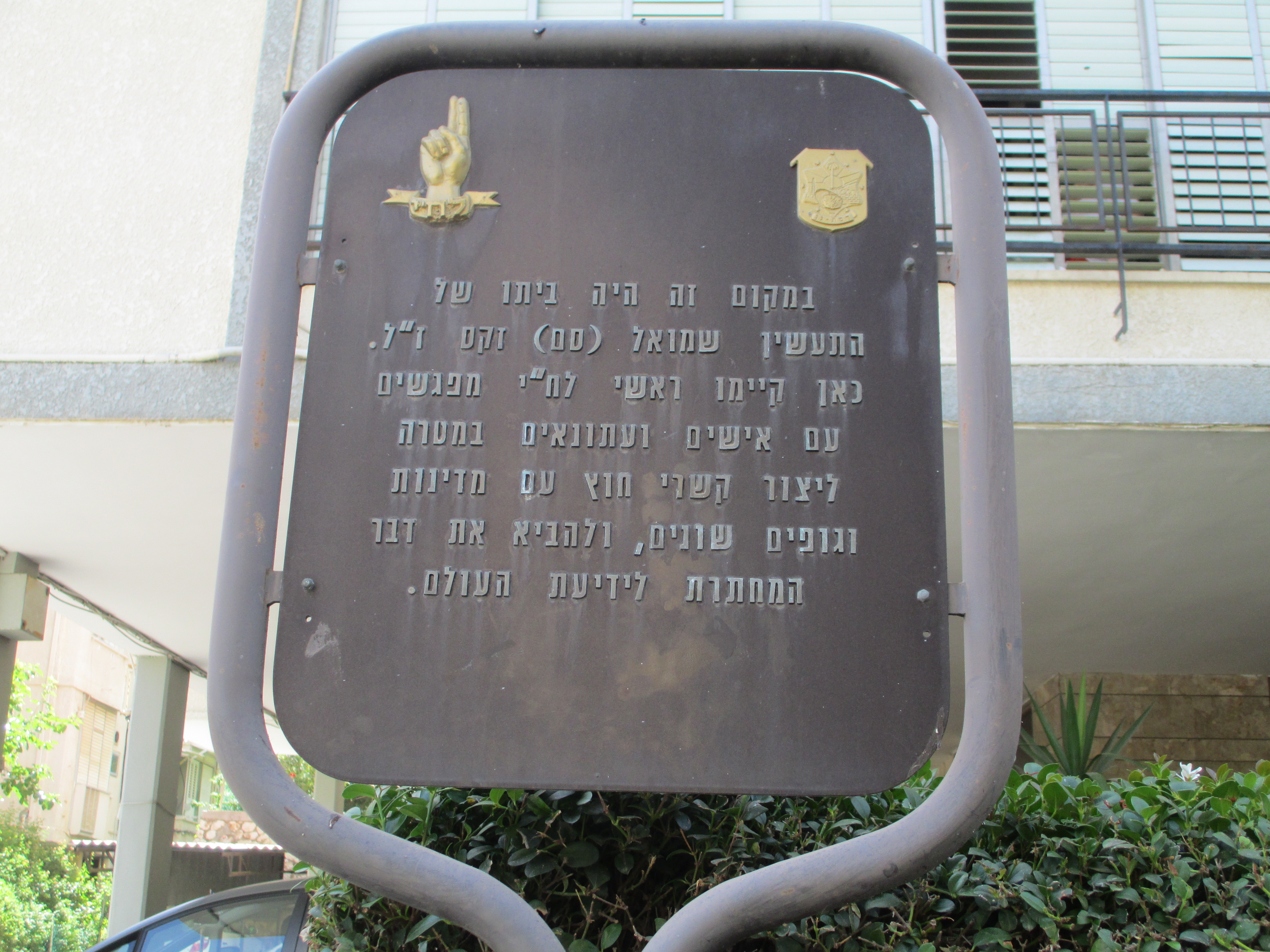 לוחית זיכרון ליד ביתו של שמואל (סם) זקס. רח' פרוג 7, רמת גן